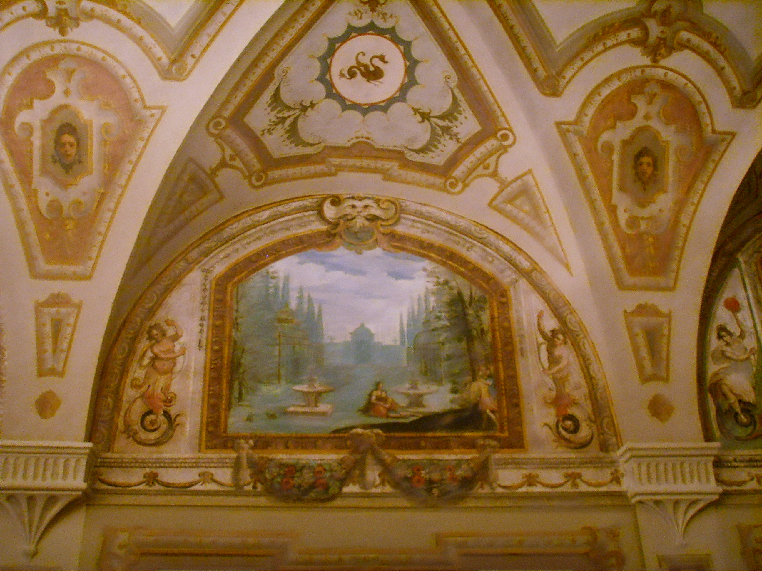 Villa di Careggi in Florence, Italy